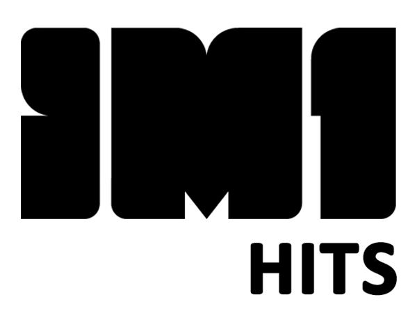 Logo des Fernsehsenders iM1 Hits.